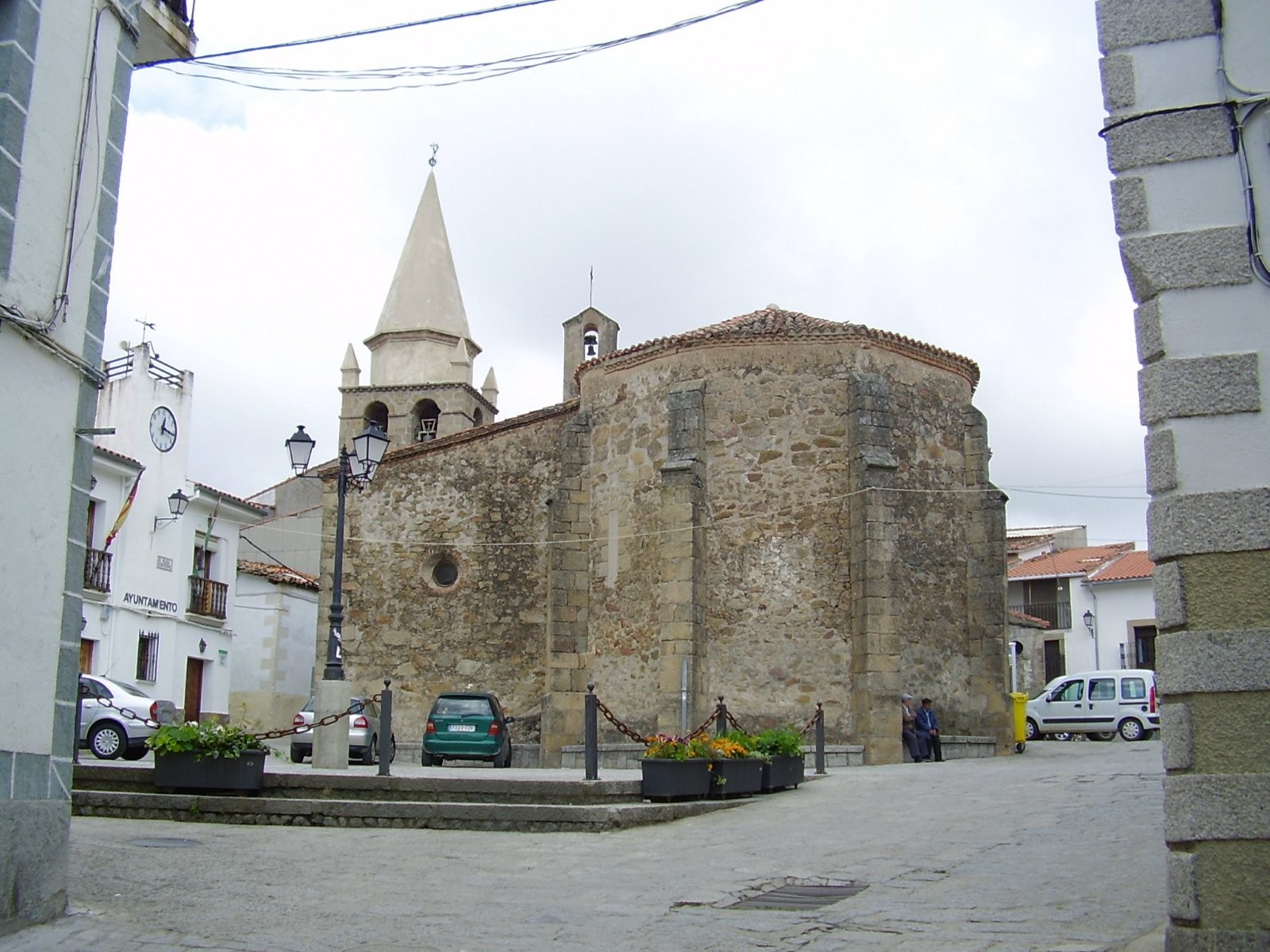 Iglesia de Arroyomolinos de la Vera, provincia de Cáceres, España, vista desde la Plaza de España del pueblo.